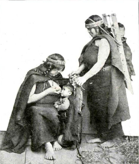 Mujeres Mapuches (Araucanas) a comienzos del siglo XX.